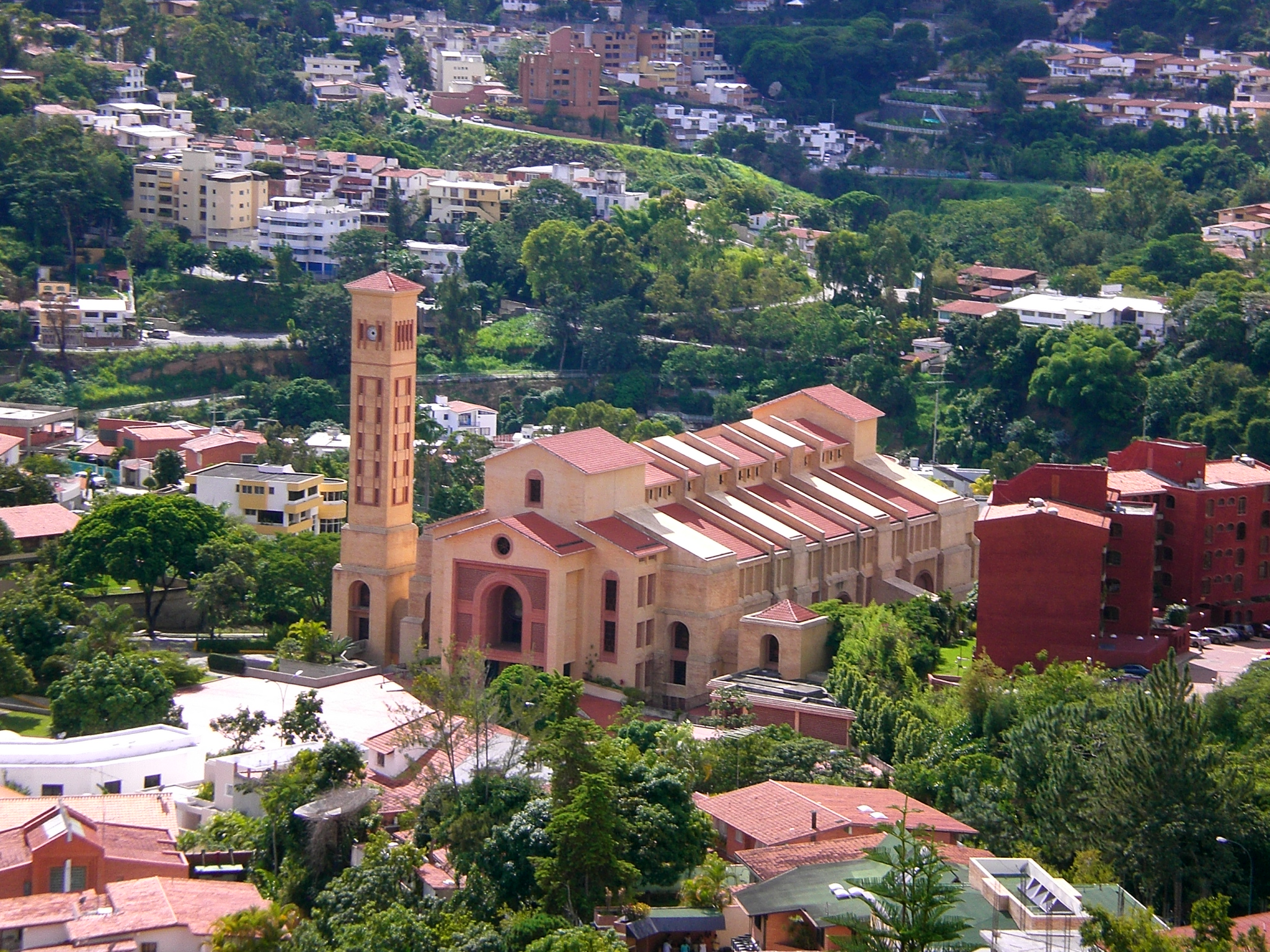 Sagrada Familia de Nazaret Church, Caracas, Venezuela